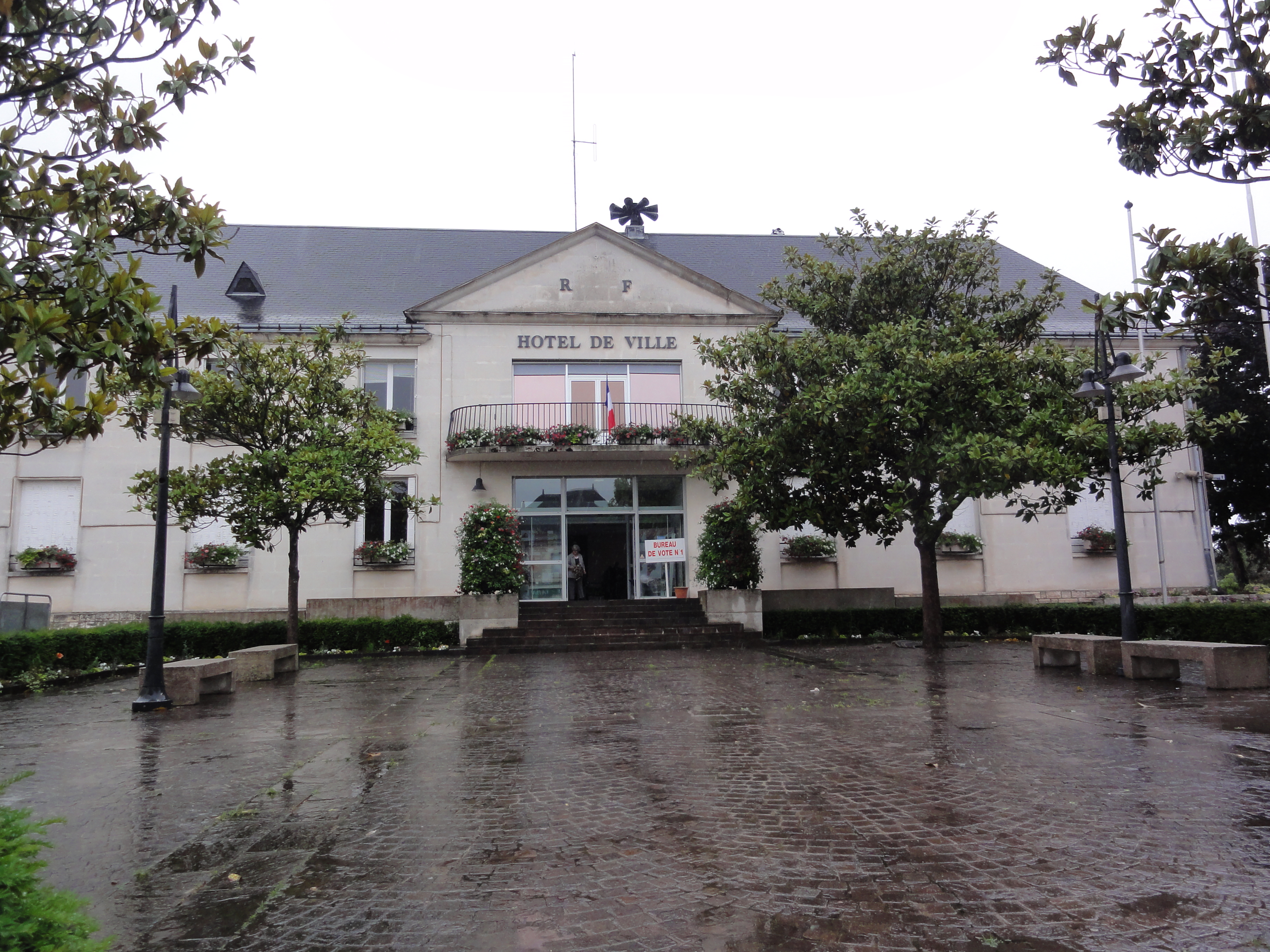 Chambray-lès-Tours (Indre-et-Loire) Mairie